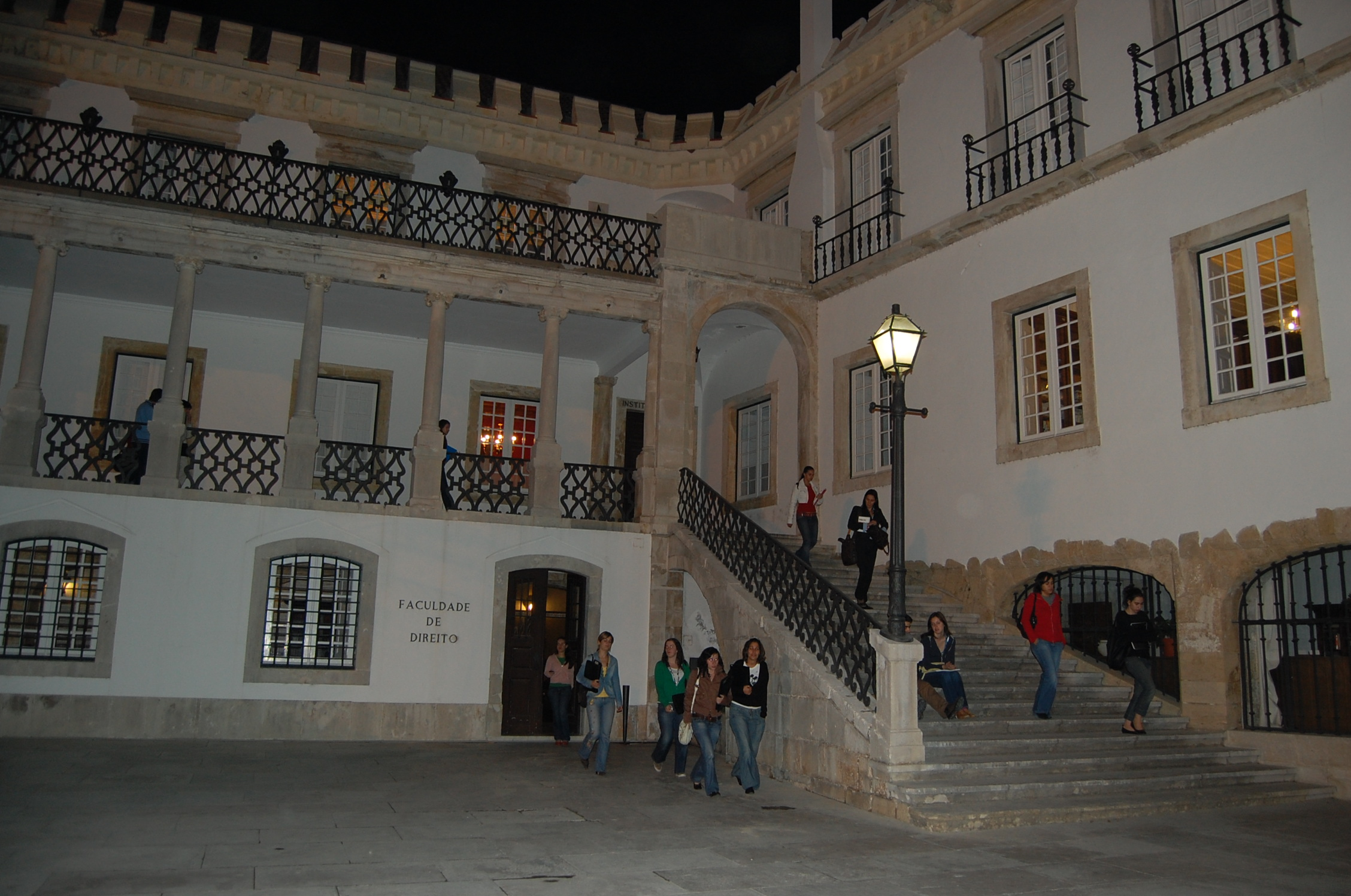 Faculdade de Direito da Universidade de Coimbra.